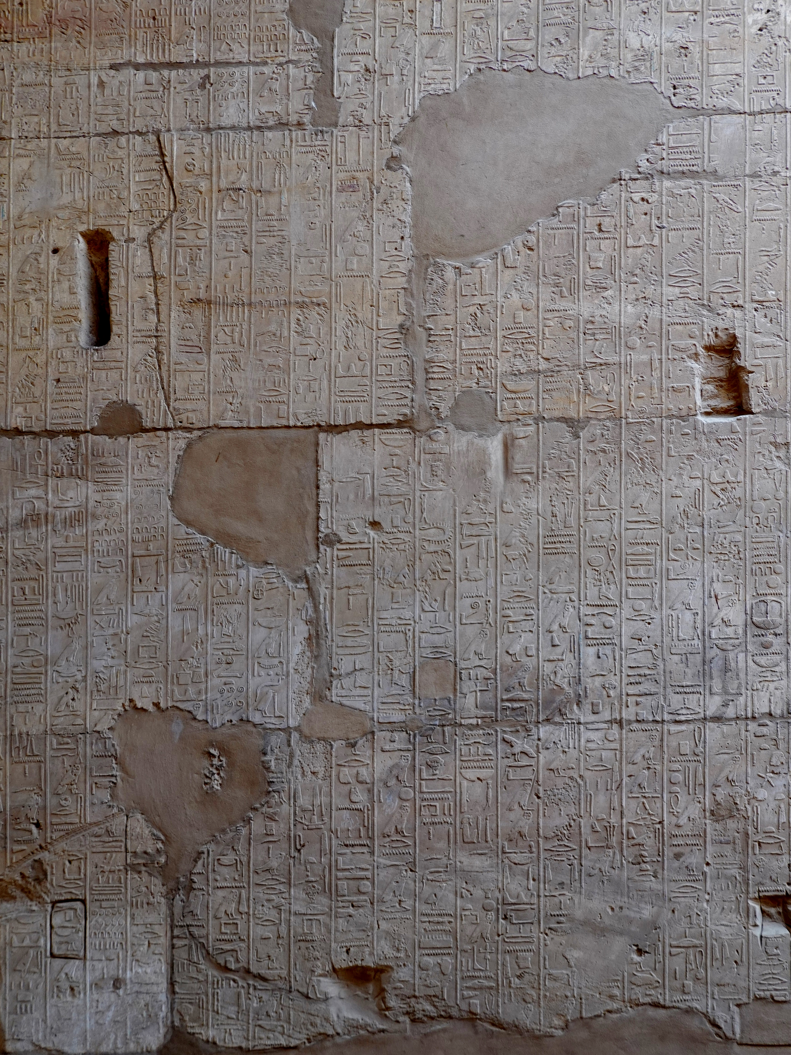 Annalen Thutmosis’ III. im Palast der Maat des Tempels von Karnak, Luxor, Ägypten